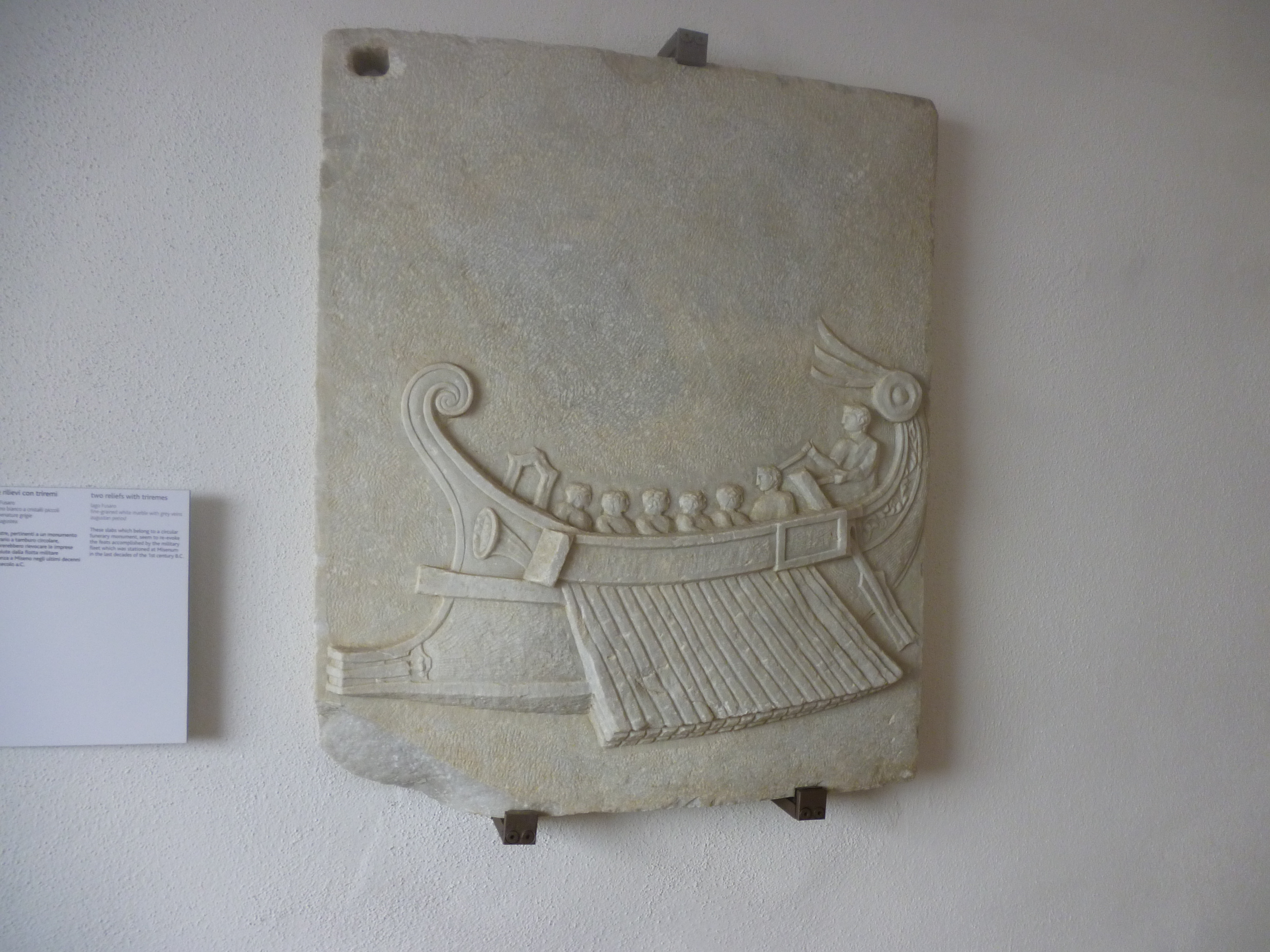 המוזיאון הארכאולוגי של קמפי פליגריי